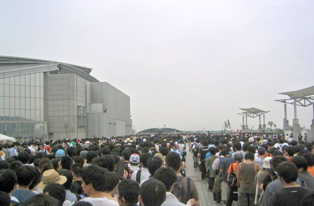 コミックマーケット70における西館屋上、企業スペース入場待機列